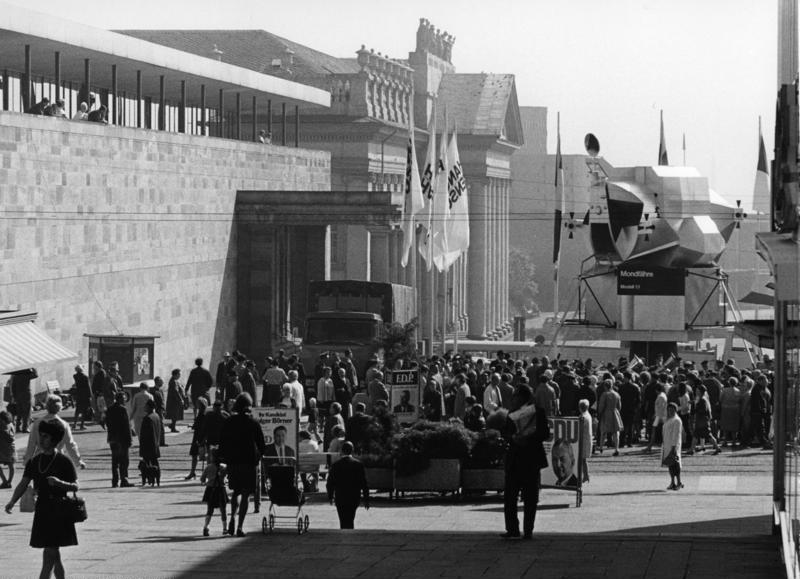 24.9.1969 Wahlkampfreise Bundesminister Willy Brandt durch Oberhessen und Niedersachsen Kassel, Friedrichsplatz